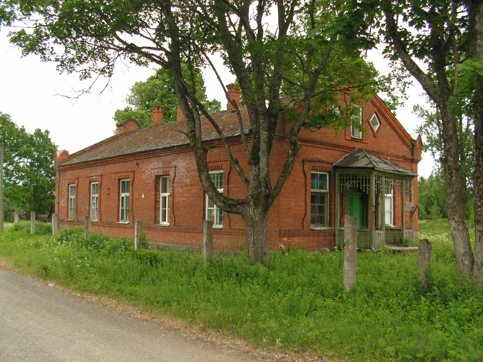 Abja linavabriku kontorihoone